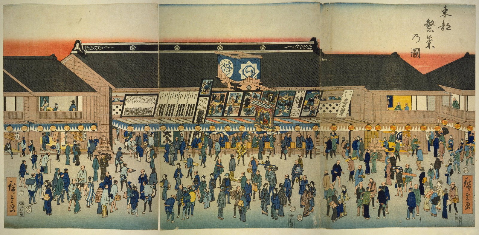 Kawarazaki-za (河原崎座)